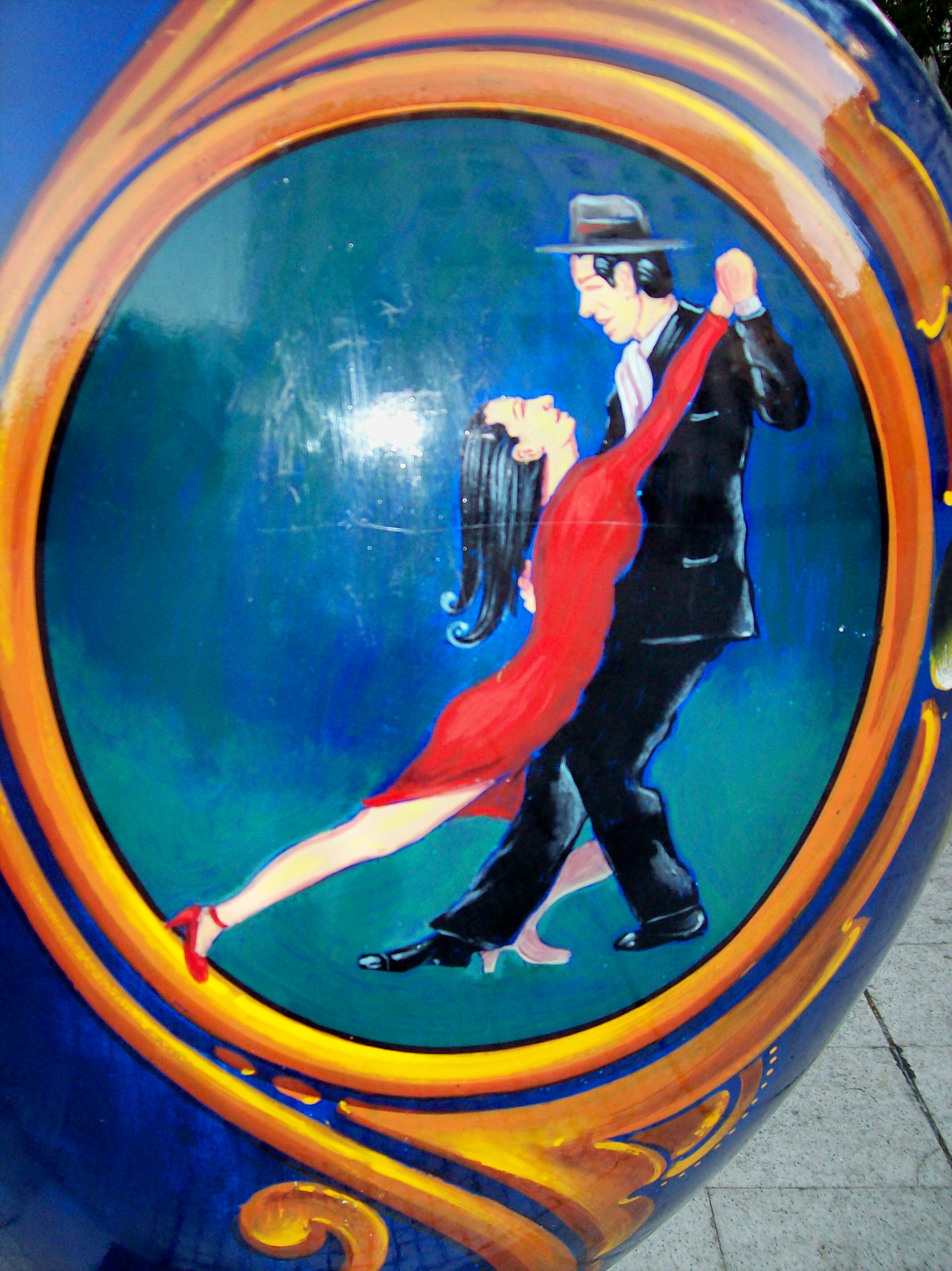 FILETEADO PORTEÑO: de Martiniano Arce. Exposición de arte en Buenos Aires "Corazones vivos" Organizada por Fundación Favaloro.